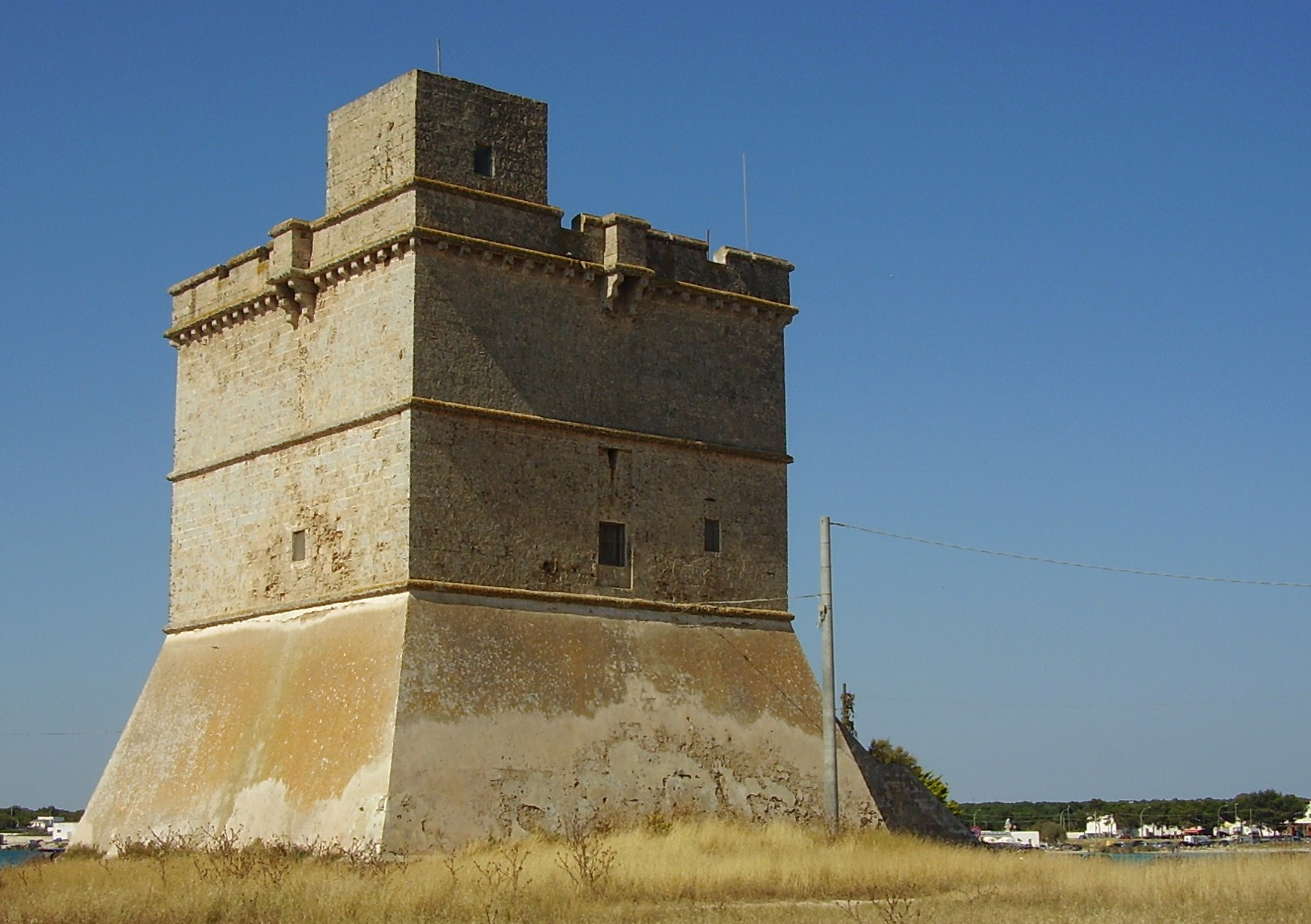 Torre Sant'Isidoro, Nardò, Lecce, Puglia